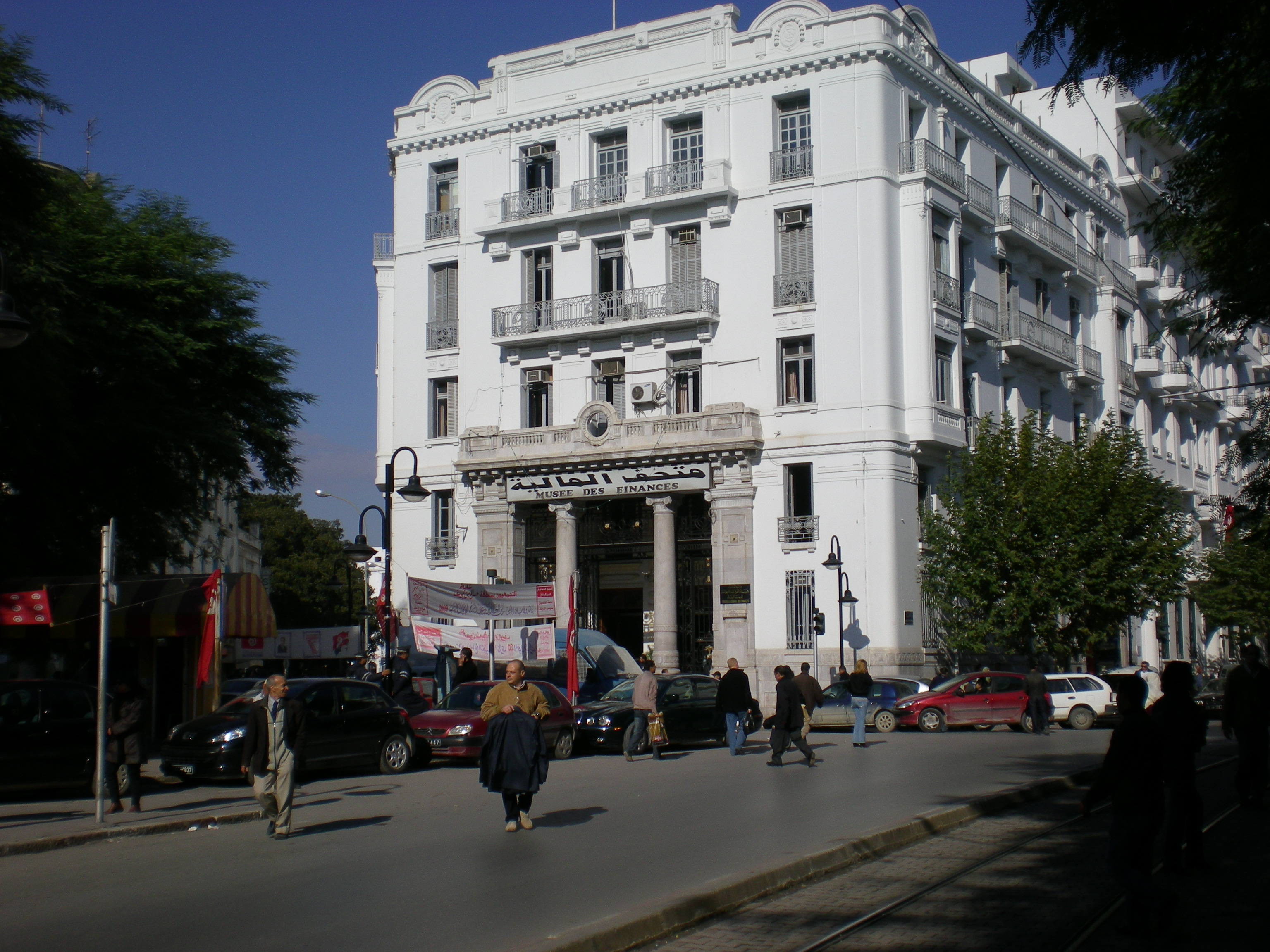 Musée des Finances à Tunis